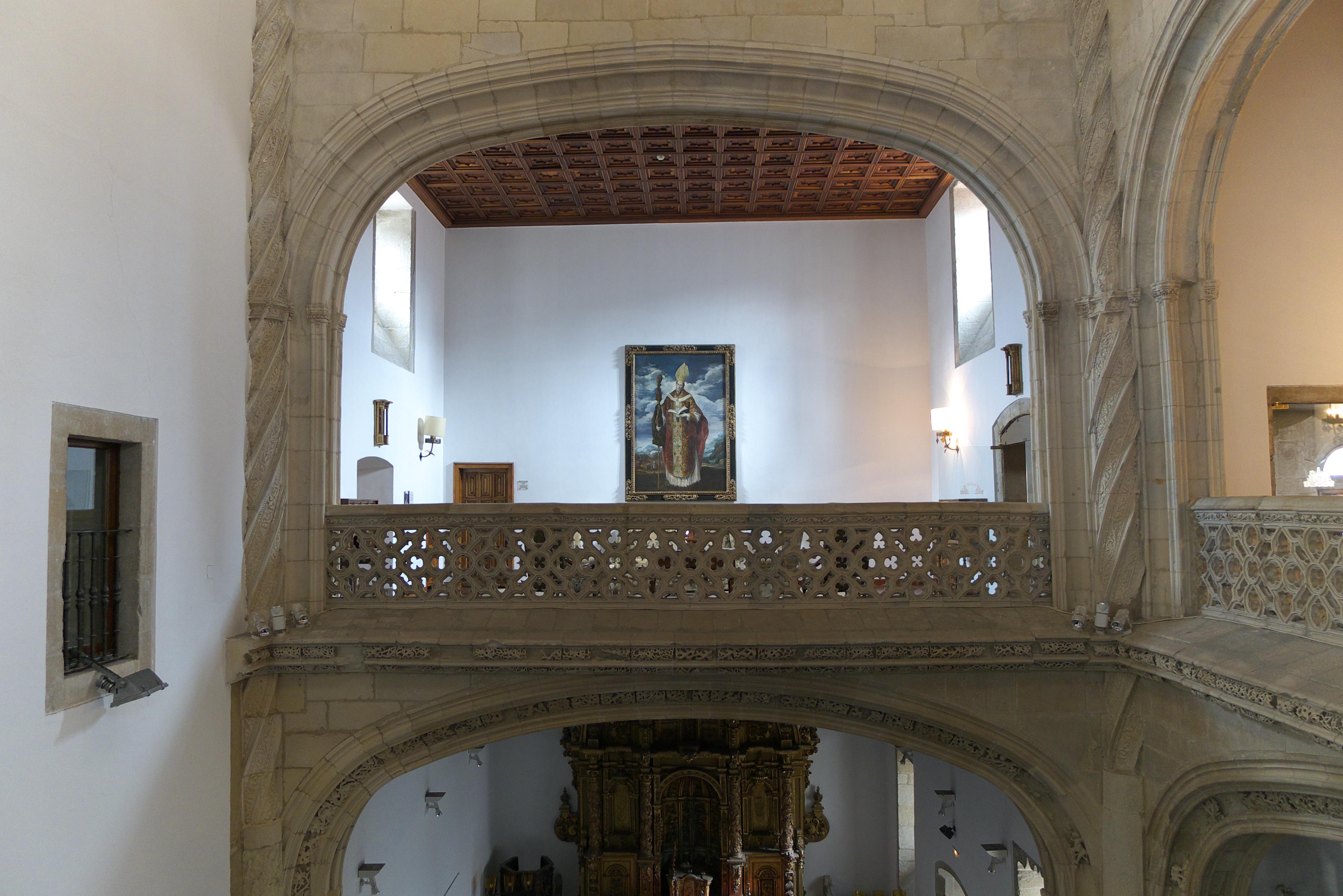 Enrique Egas proyectó la capilla gótica del Hospital. Otros maestros recibieron distintos trabajos, como Juan de Álava o Nicolás de Chanterenne.